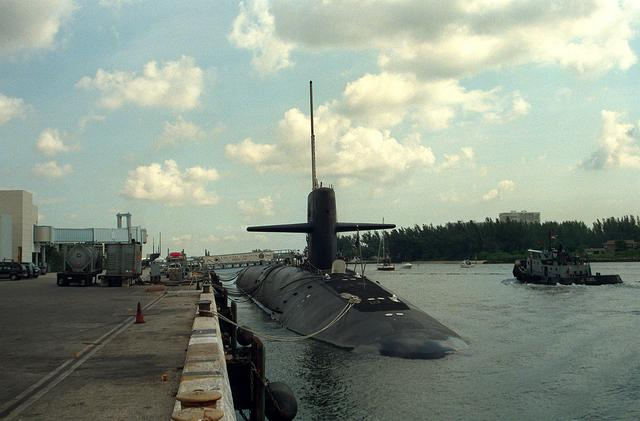 USS West Virginia (SSBN-736)